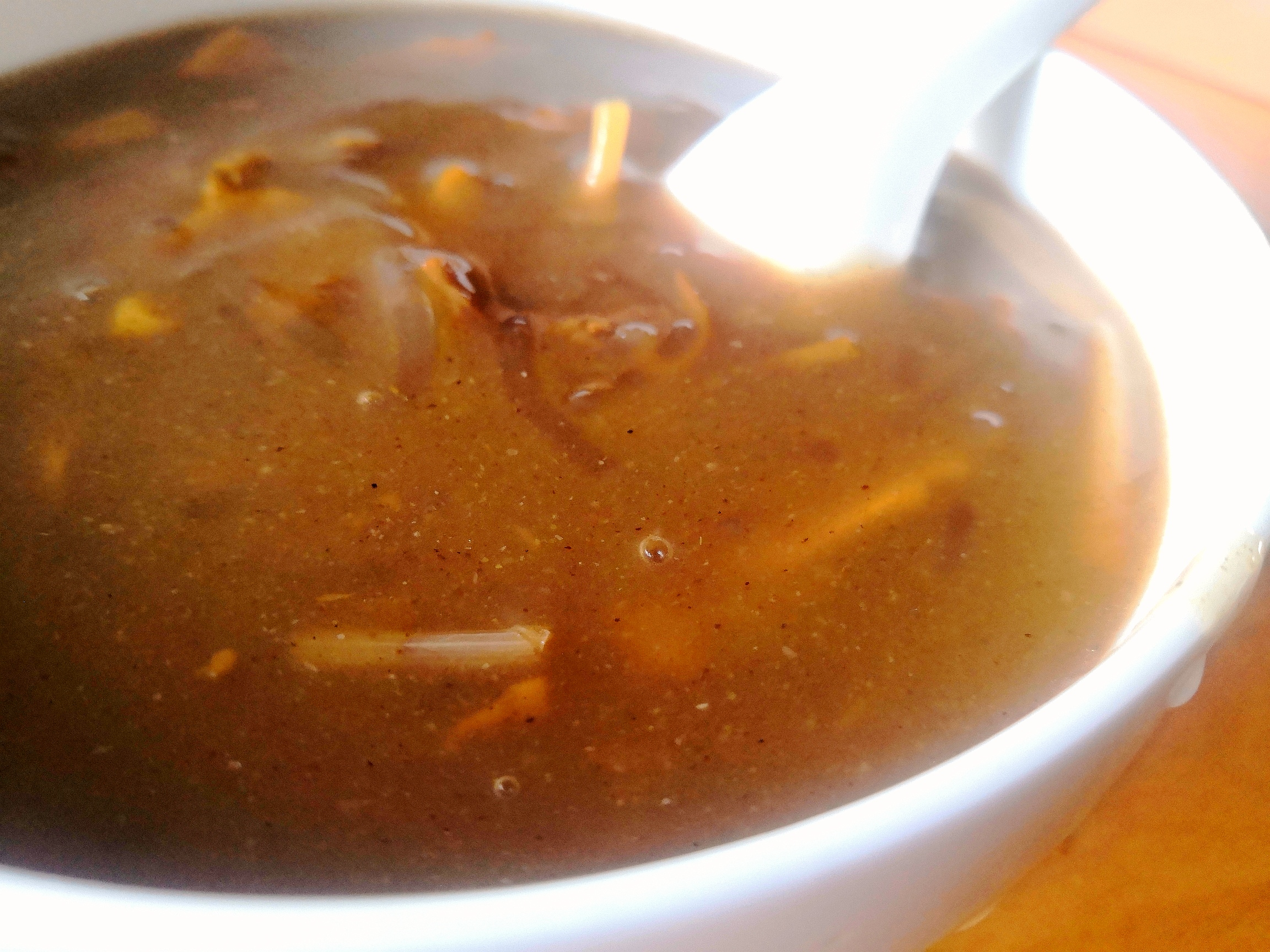 中文（中国大陆）: 一碗胡辣汤